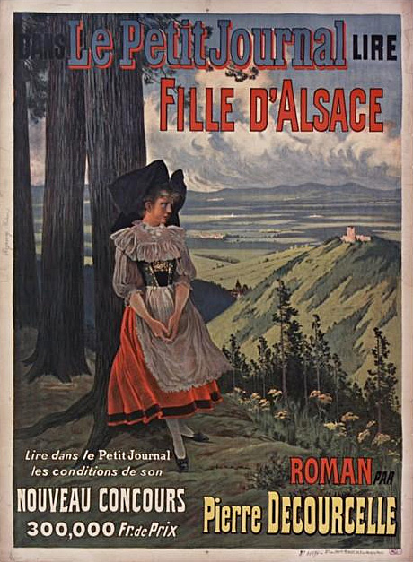 Dans Le Petit Journal lire Fille d'Alsace, roman par Pierre Decourcelle : affiche